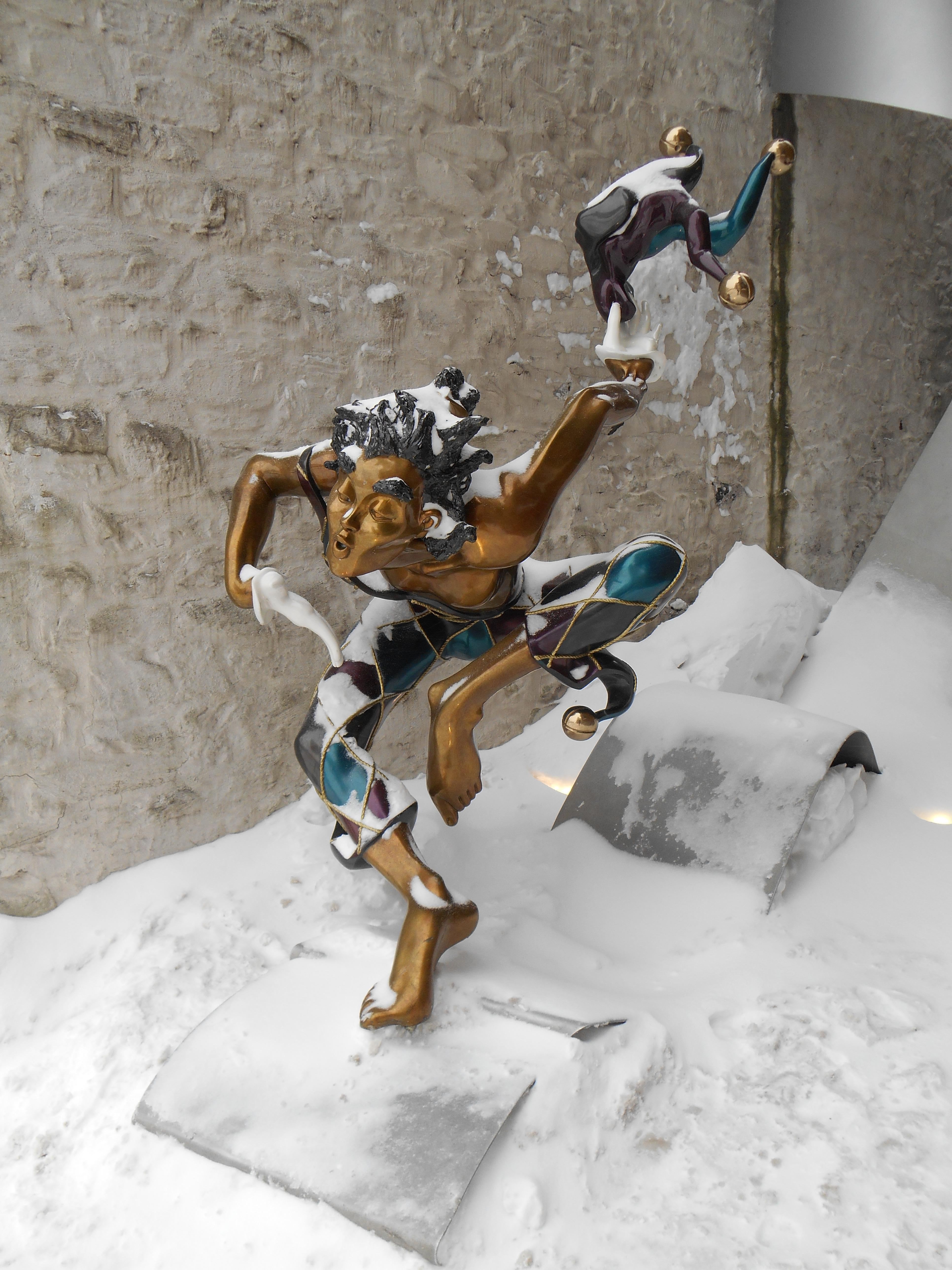 Bienvenue, sculpture de Nicole Taillon, installée près de la Caisse Populaire du Vieux-Québec, 19, rue des Jardins